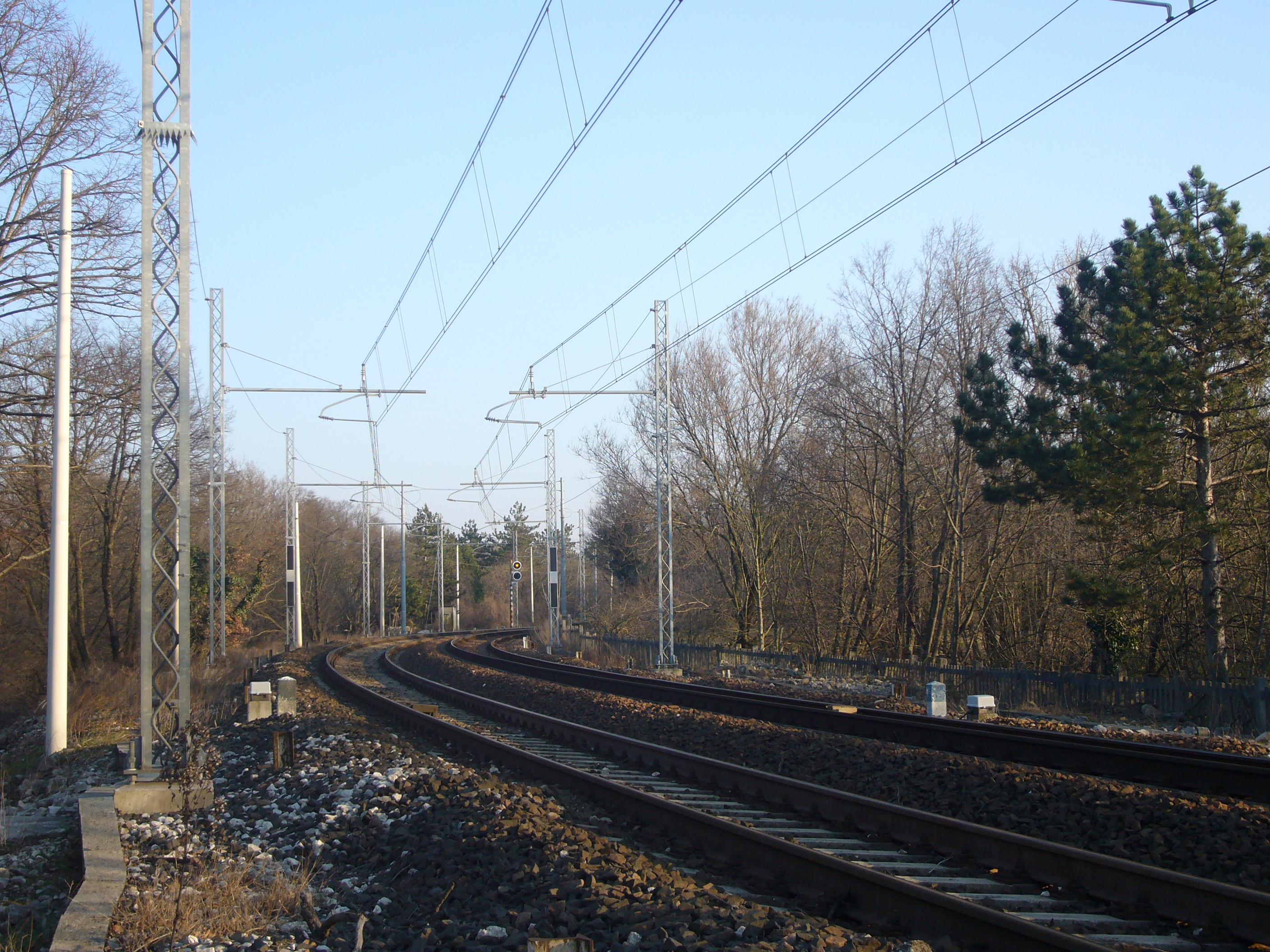 I binari della ferrovia Trieste Centrale-Villa Opicina fotografati nelle vicinanze dell'ex-stazione di Prosecco